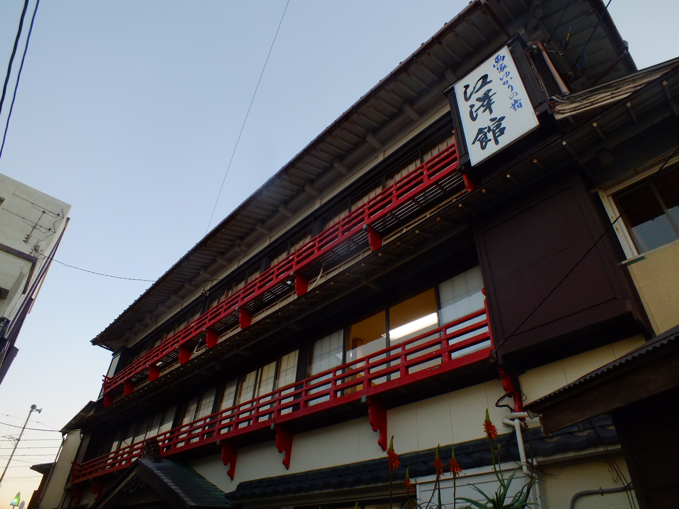 千葉県鴨川市太海浜 江澤館 Futomihama,Kamogawa,Chiba